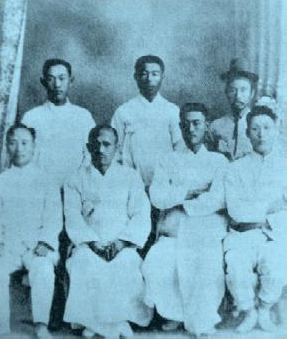 박차정